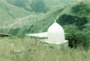 могила Магомеда Ярагского. Село Согратль Гунибского района Дагестана.